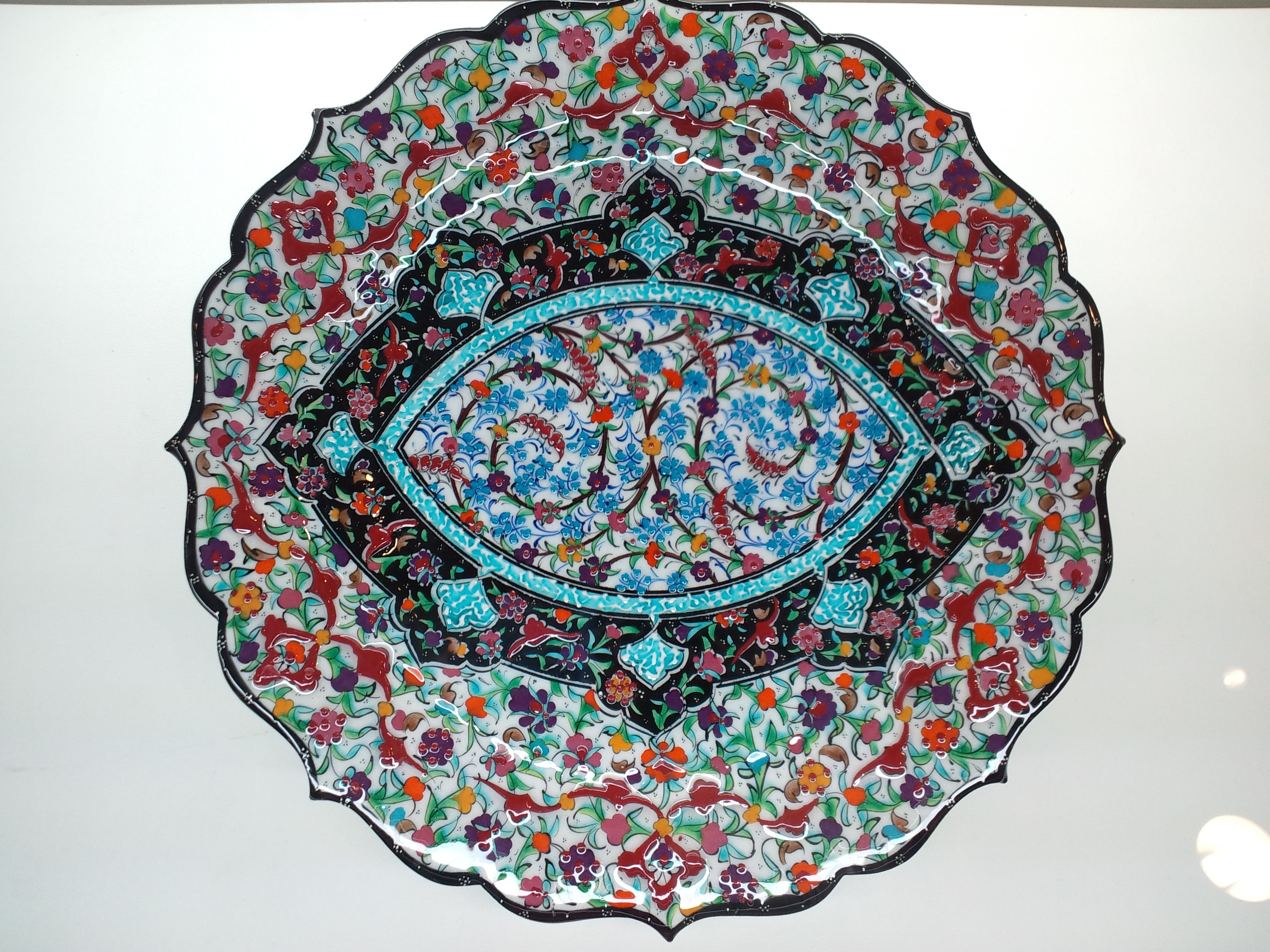 リトルワールド エキゾチックトルコ文化展 セラミッキ（陶器）、タバック（絵皿）